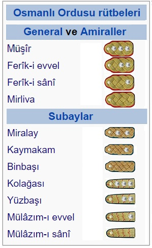 Osmanlı rütbelerini Vikipedi'deki şablon ve rütbe resimlerinden meydana getirdim.